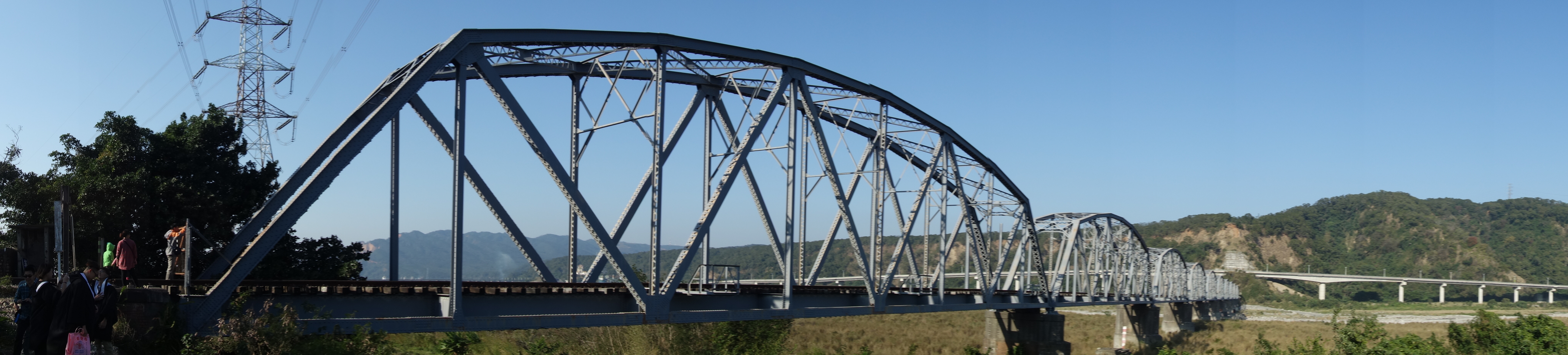 舊山線 大安溪鐵橋 建造年: 1908